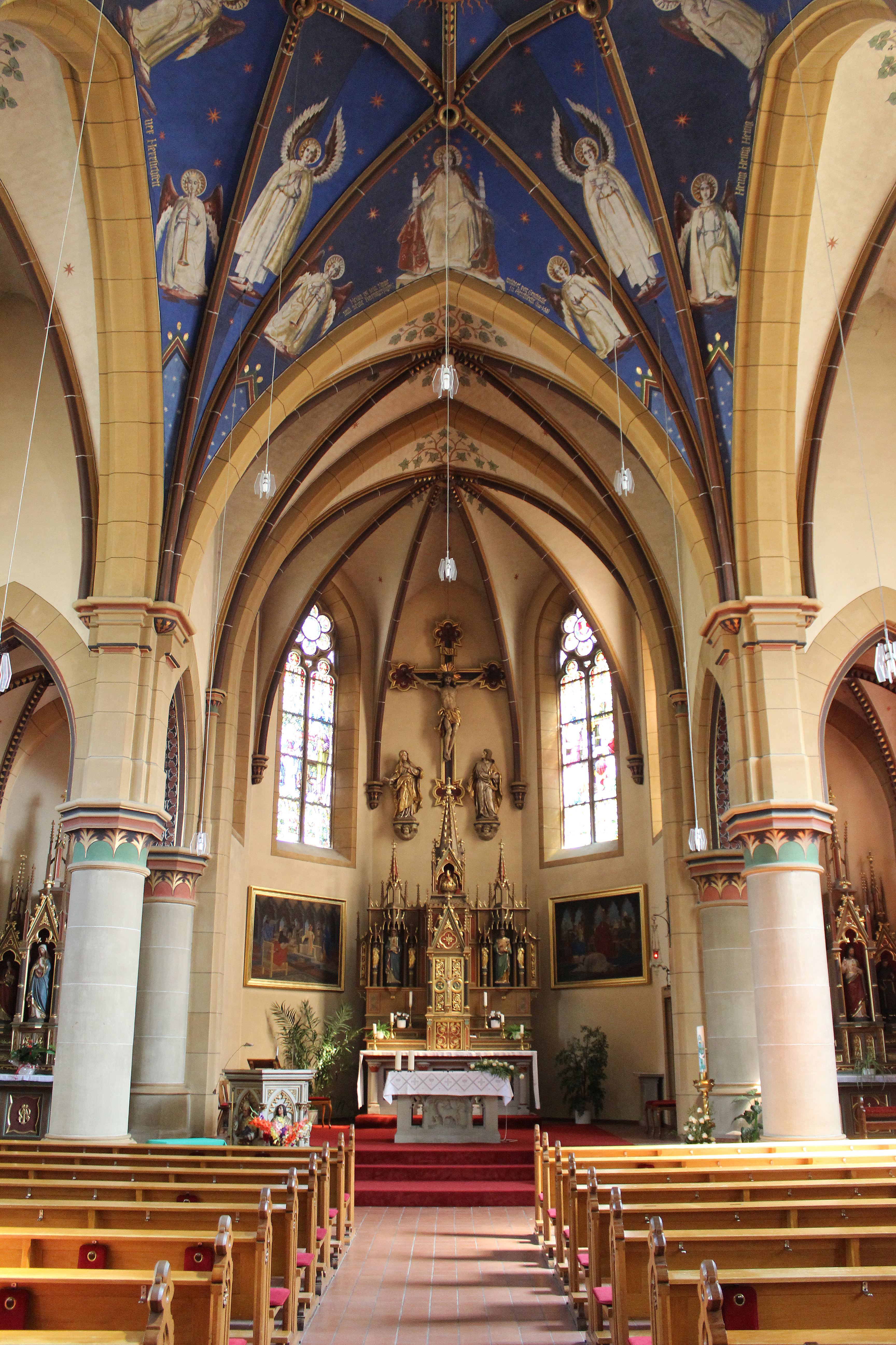 Blick ins Innere der katholischen Pfarrkirche Heilige Familie in Winterbach, einem Stadtteil von St. Wendel, Landkreis St. Wendel, Saarland